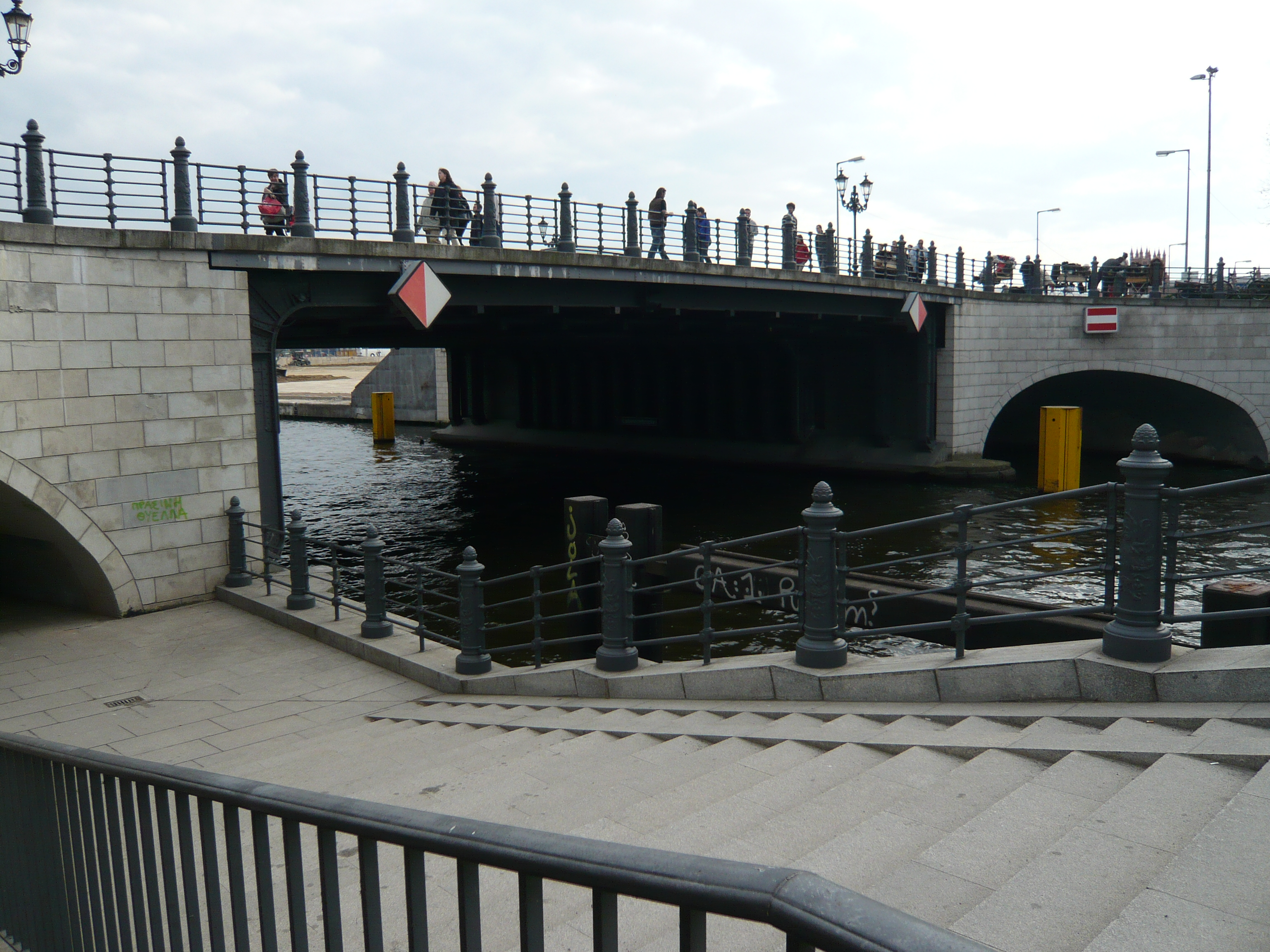 Berlin; Liebknechtbrücke